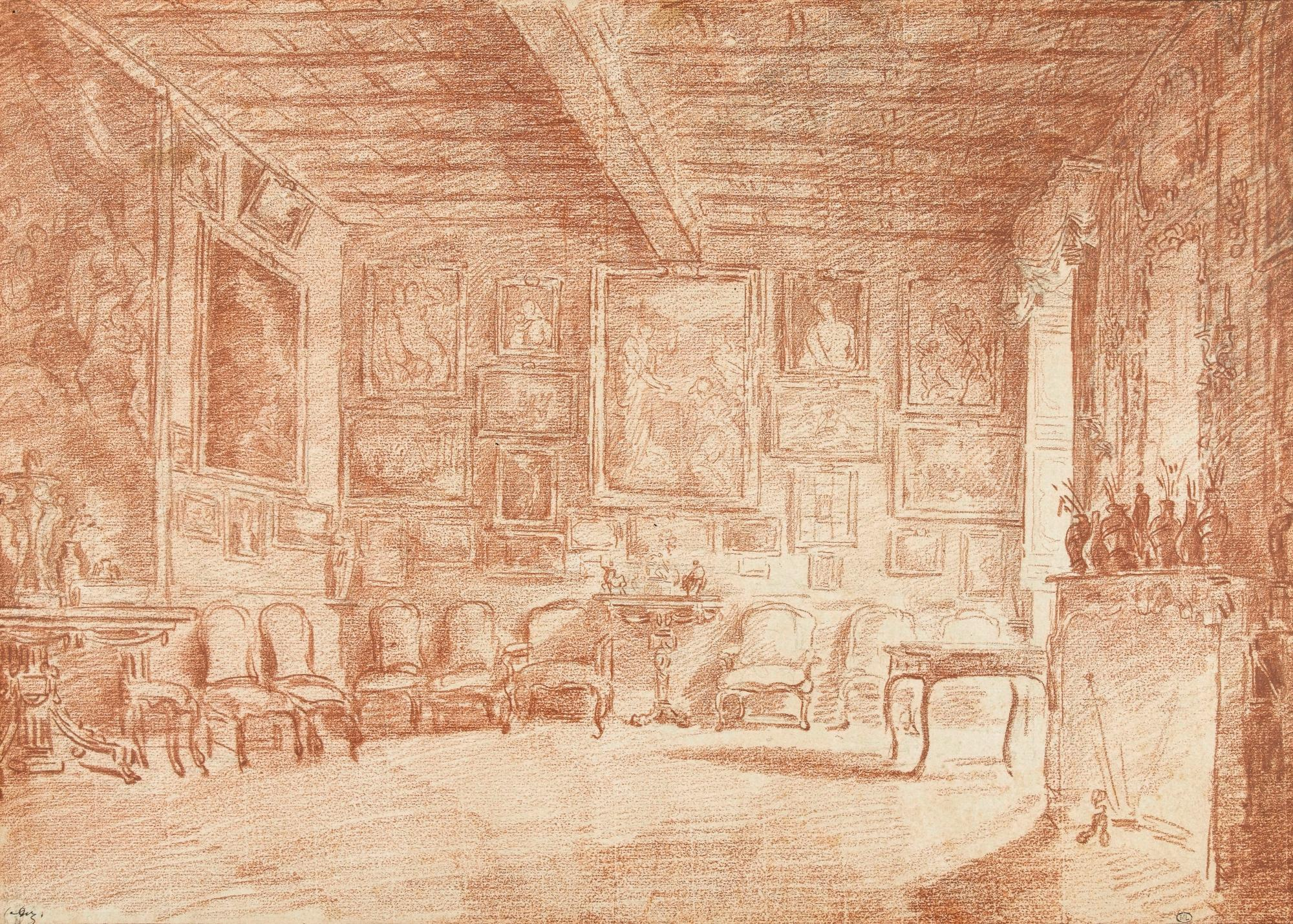 Dessin représentant le salon du bailli de Breteuil. Plusieurs des œuvres sont reconnaissables sur le dessin